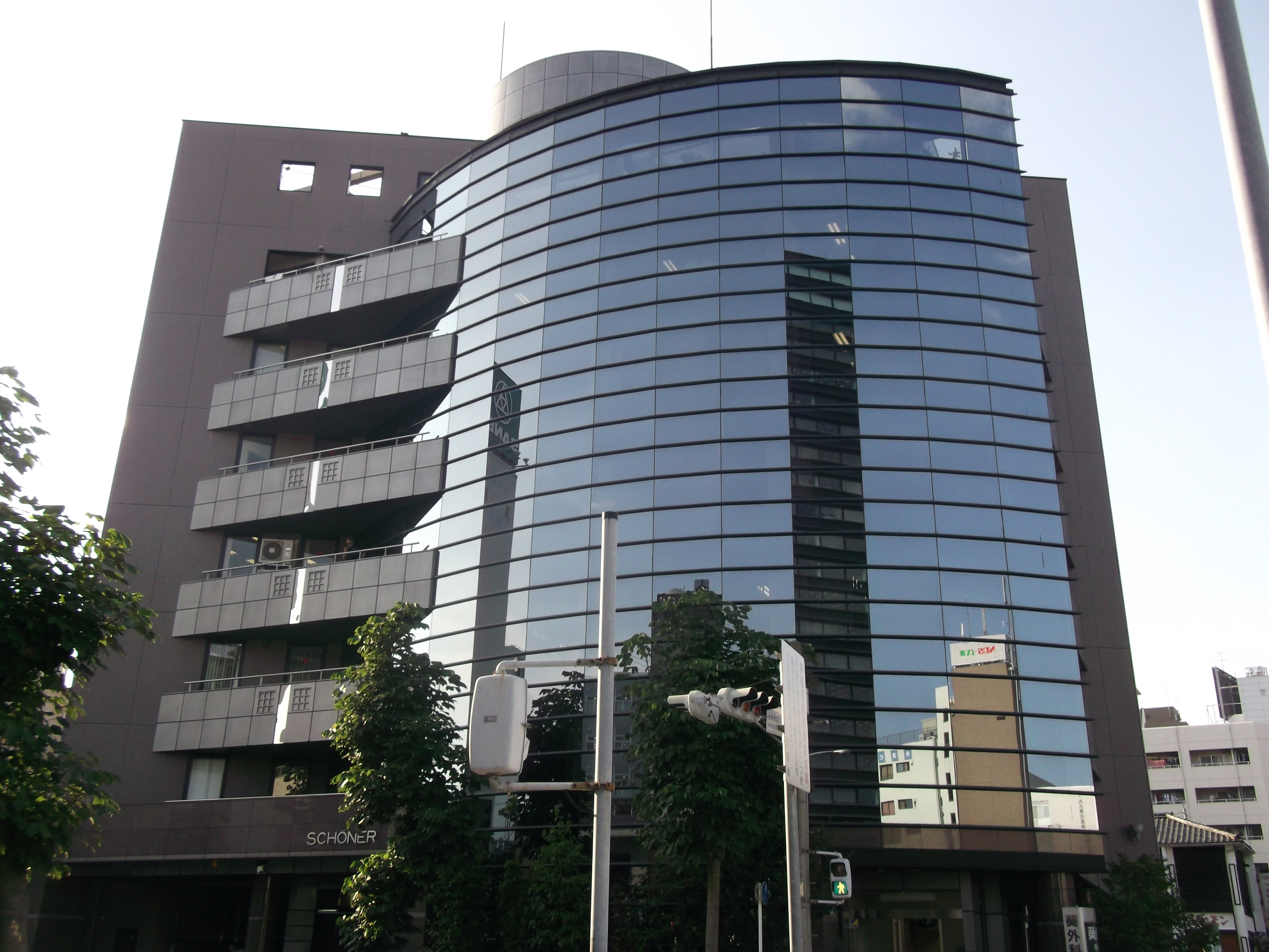 名古屋市東区東桜のシェーネルビル（ファイナルフューチャーインターナショナル本社が入居する）を南側より撮影